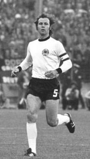 ADN-ZB/Mittelstädt/22/6/74/BRD/Hamburg: X. Fußball-Weltmeisterschaft/1. Finalrunde, Gruppe 1: DDR - BRD 1:0 – Franz Beckenbauer